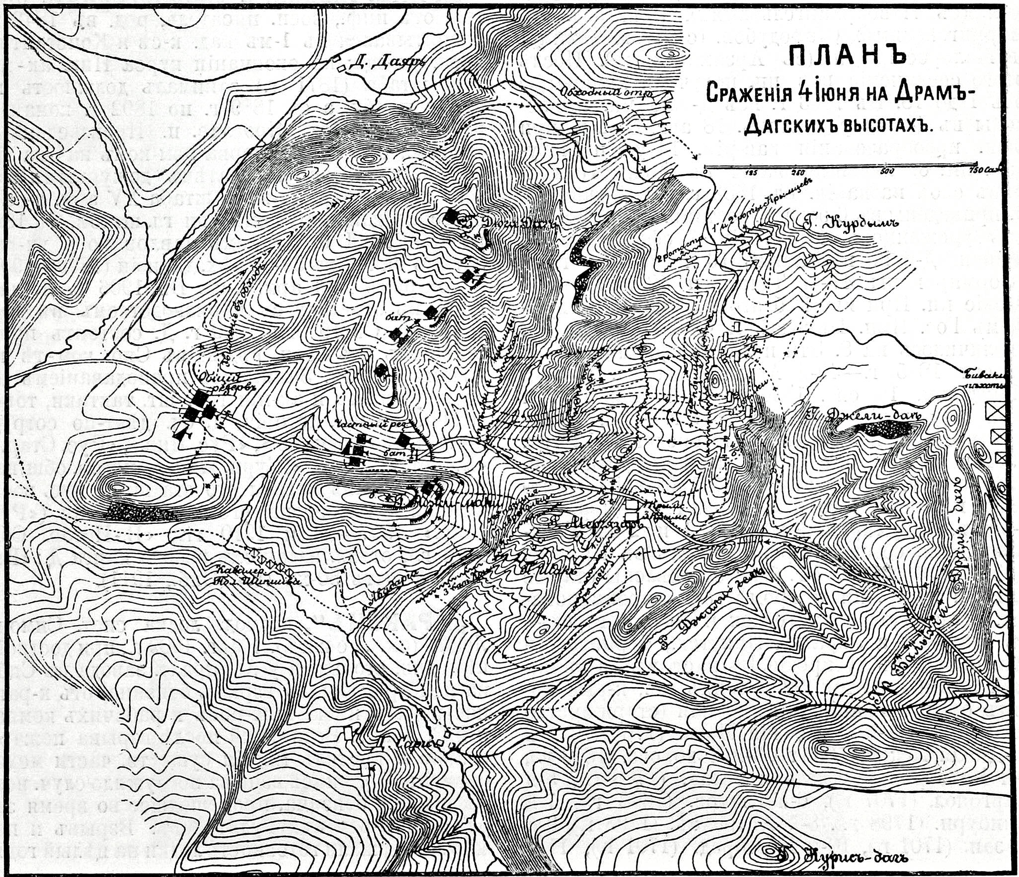 Это изображение было использовано для иллюстрирования статьи «Драм-Даг» опубликованной в девятом томе «Военной энциклопедии», который был издан книгоиздательским товариществом И. Д. Сытина в 1912 году в столице Российской империи городе Санкт-Петербурге.